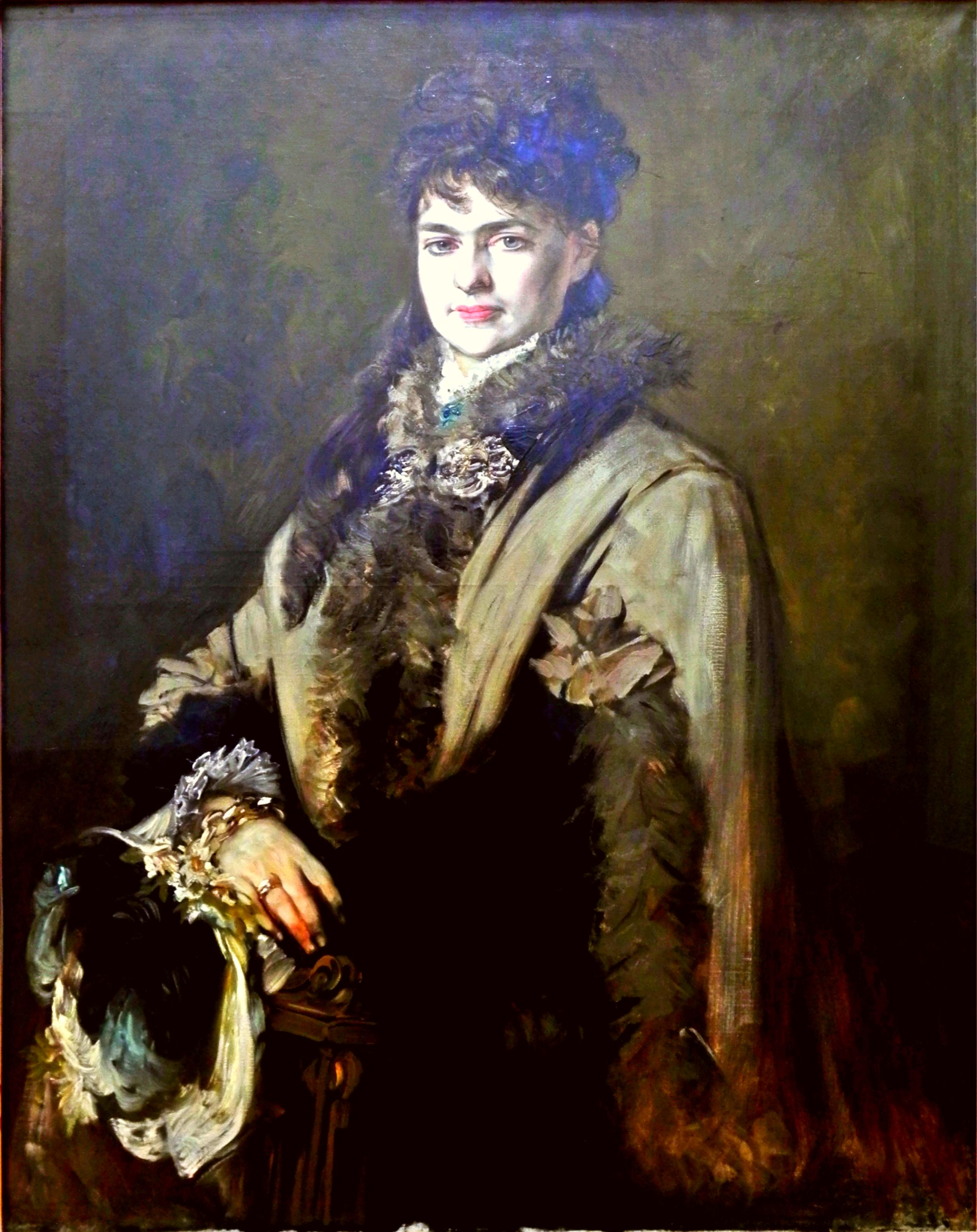 Das Bild zeigt Cécile von Munkácsy, die Gattin des ungarischen Malers Mihály Munkácsy. Vermutlich ein Hochzeitsgeschenk des Künstlers für das junge Ehepaar.